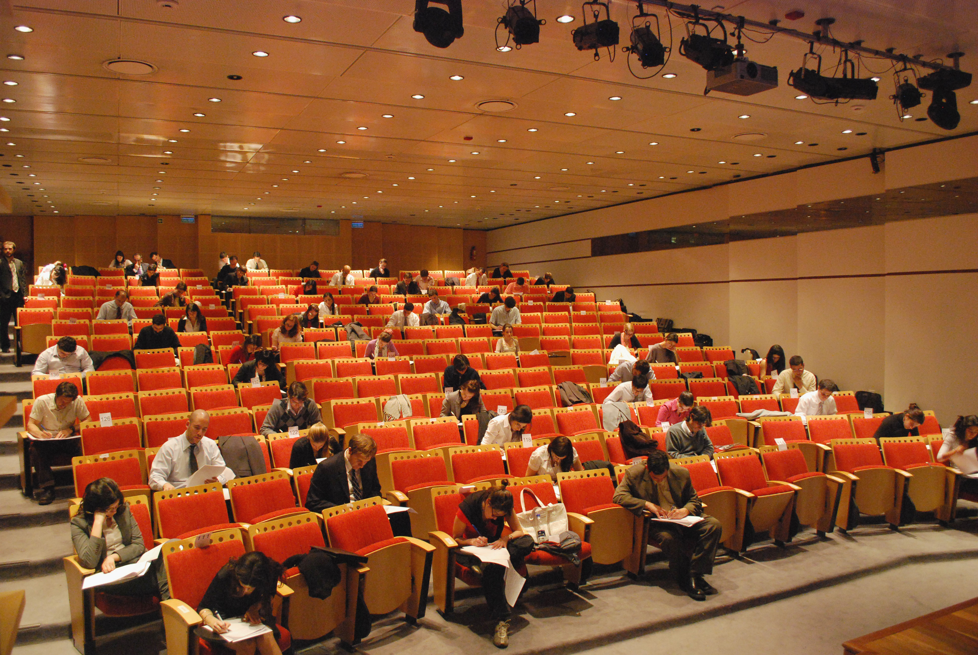 Foto del Concurso de Ingreso al Instituto del Servicio Exterior de la Nación